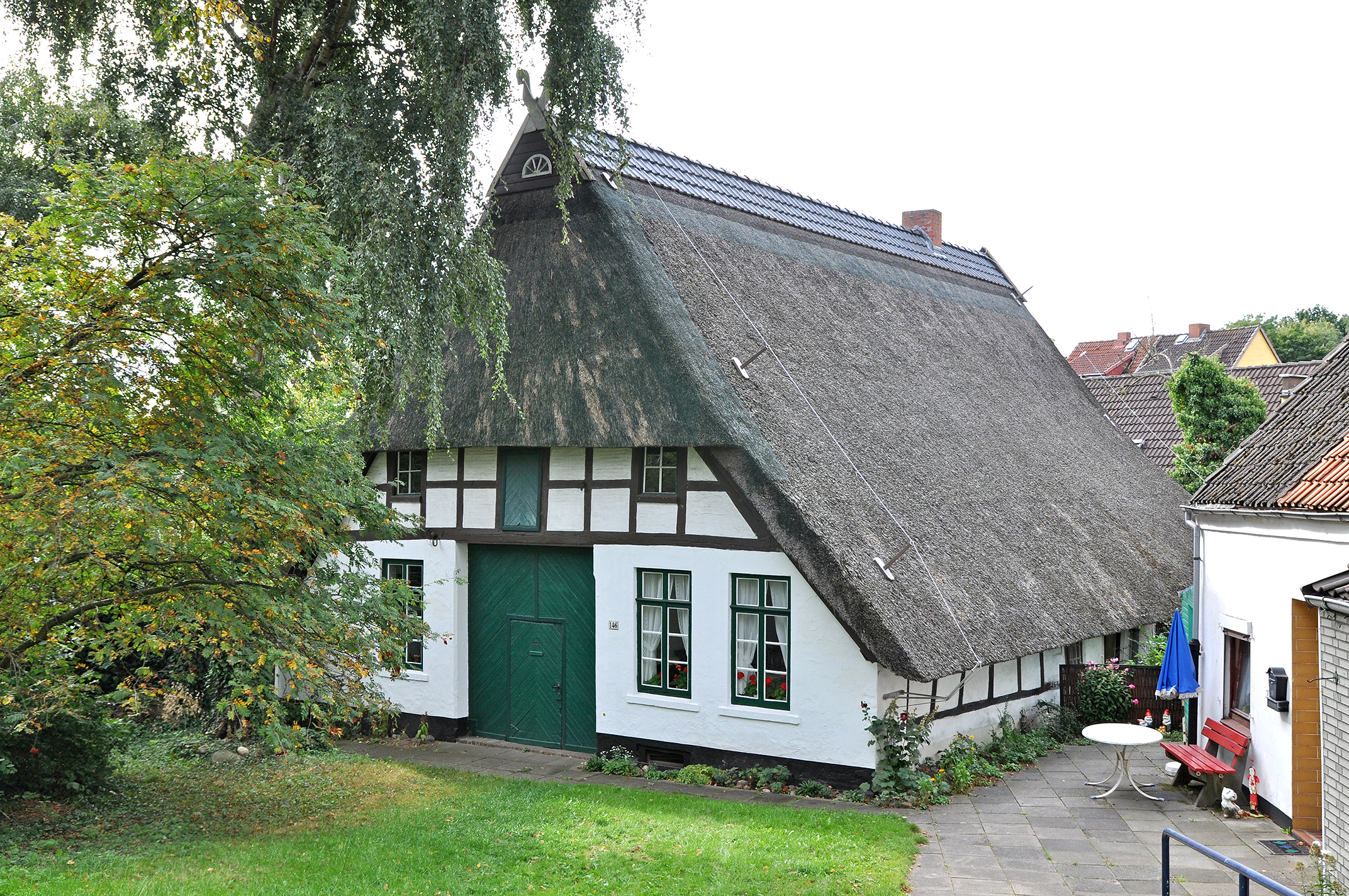 Bauernhaus in Bremen, Westerdeich 146Das abgebildete Objekt ist ein geschütztes Kulturdenkmal in der Freien Hansestadt Bremen, mit der Nr. 1222 beim Landesamt für Denkmalpflege registriert.